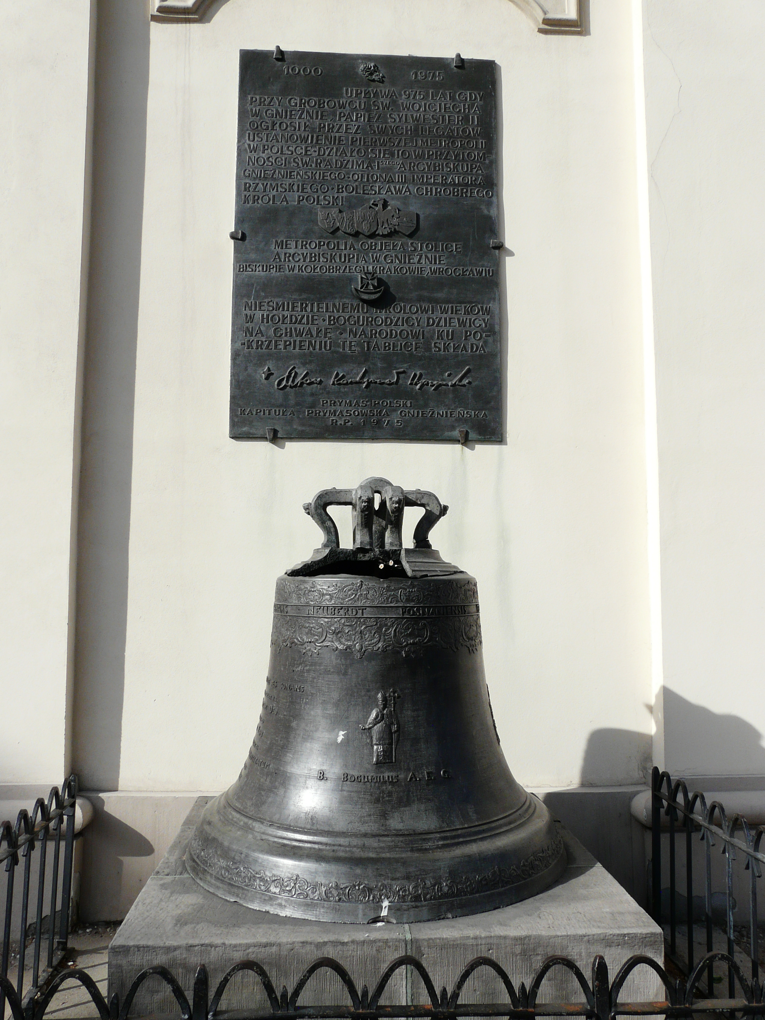 Gniezno, Poland Bell "Bogumilus" Dzwon "Bogumił"(Bogumilus) przy południowych murach archikatedry gnieźnieńskiej. Odlany w 1761 r. przez J. Z. Neuberta. Dzwon poświęcony pierwszemu arcybiskupowi Gniezna wydawał ton Es.